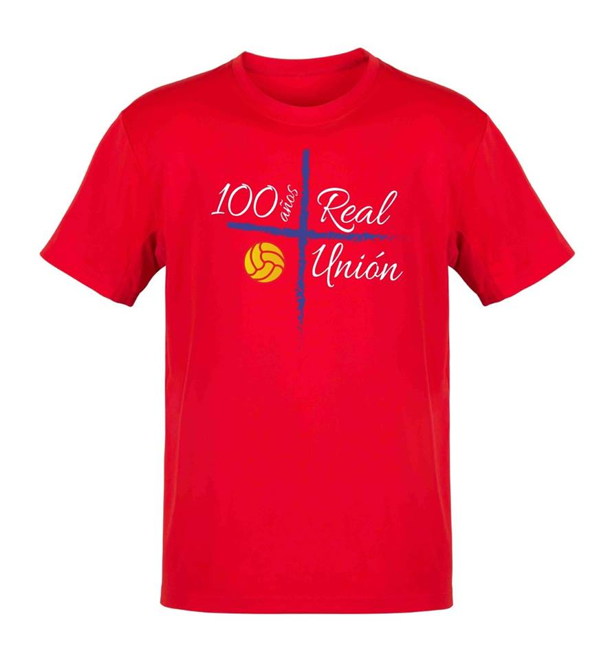 Camiseta oficial del Centenario del Real Unión de Tenerife